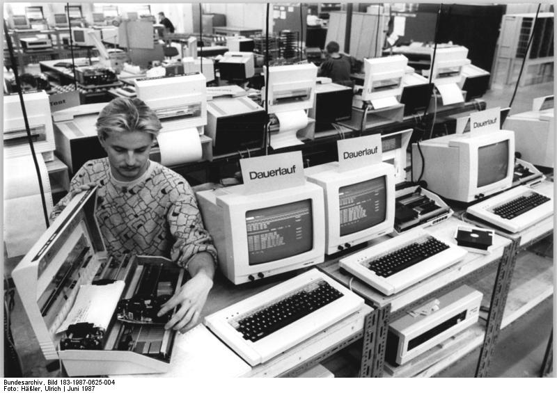 VEB Robotron Elektronik Dresden, Computer A 7100 ADN-ZB Häßler 25.6.87 Dresden: Zusätzliche Computer- Seit der Übernahme ihrer Wettbewerbsverpflichtungen Mitte Mai haben die Kollektive des VEB Robotron-Elektronik Dresden gemeinsam mit ihren Partnern 670 Arbeitsplatz-Computer "A 7 100" zusätzlich hergestellt. Ihr Ziel ist es, in diesem Jahr 10.000 dieser 16-bit-Rechner mehr als geplant zu produzieren. Prüffeldmechaniker Thomas Häßlich nimmt die Endkontrolle vor. - siehe auch 1987-0625-2 und 3N